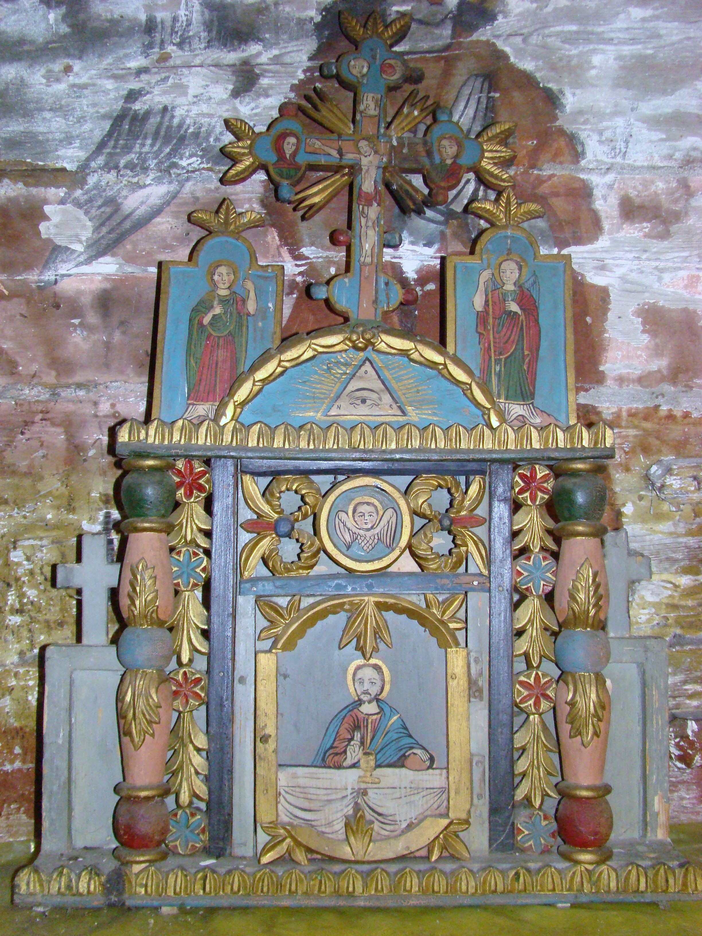 Dealu Geoagiului, județul Alba